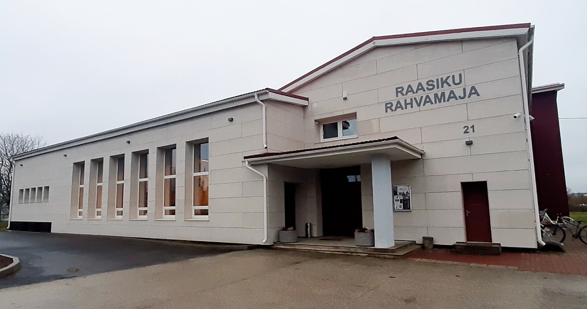 Raasiku Rahvamaja tänapäeval